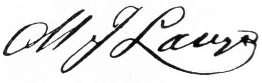 Mads Johansen Langes signatur.